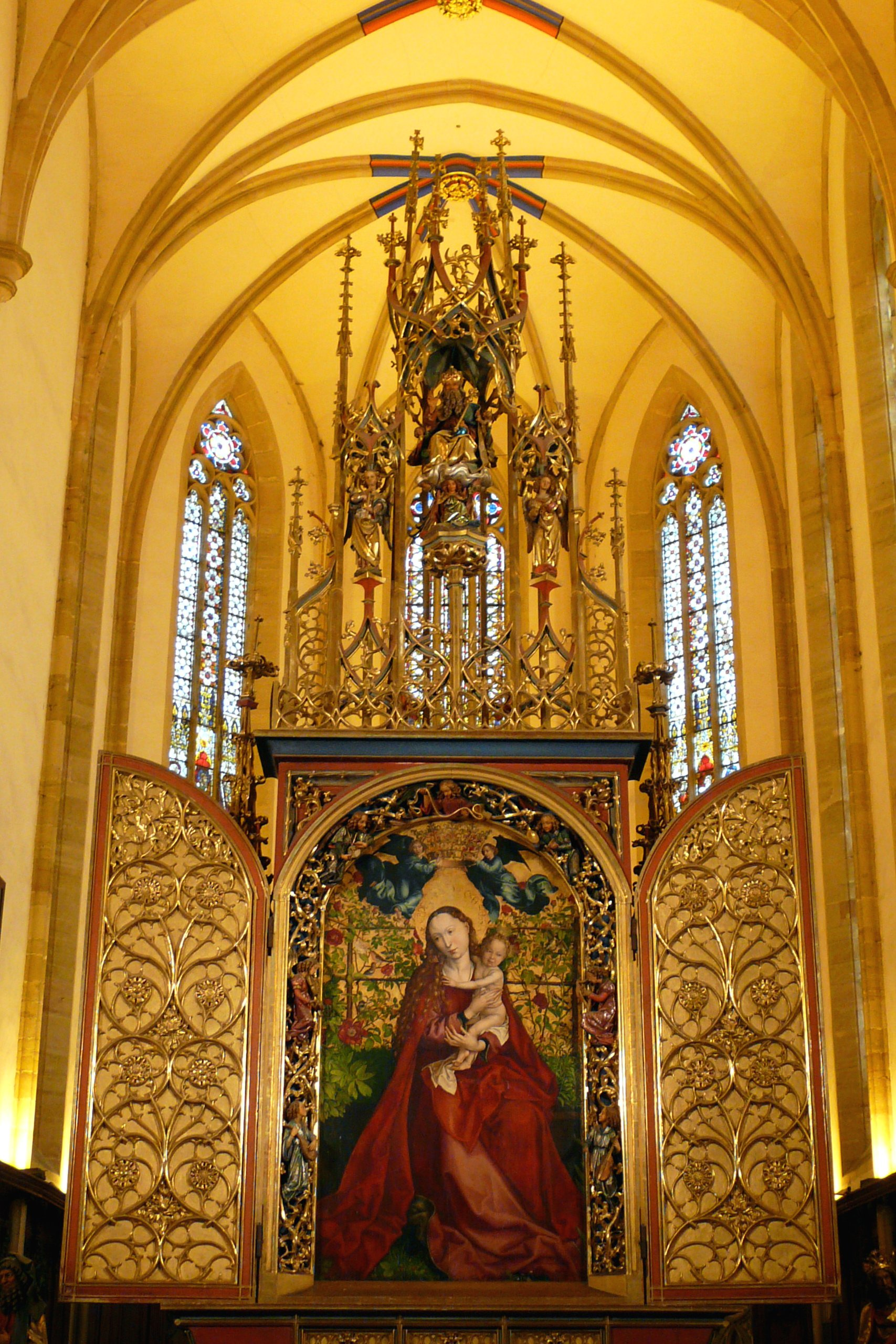 Vierge au Buisson, Colmar